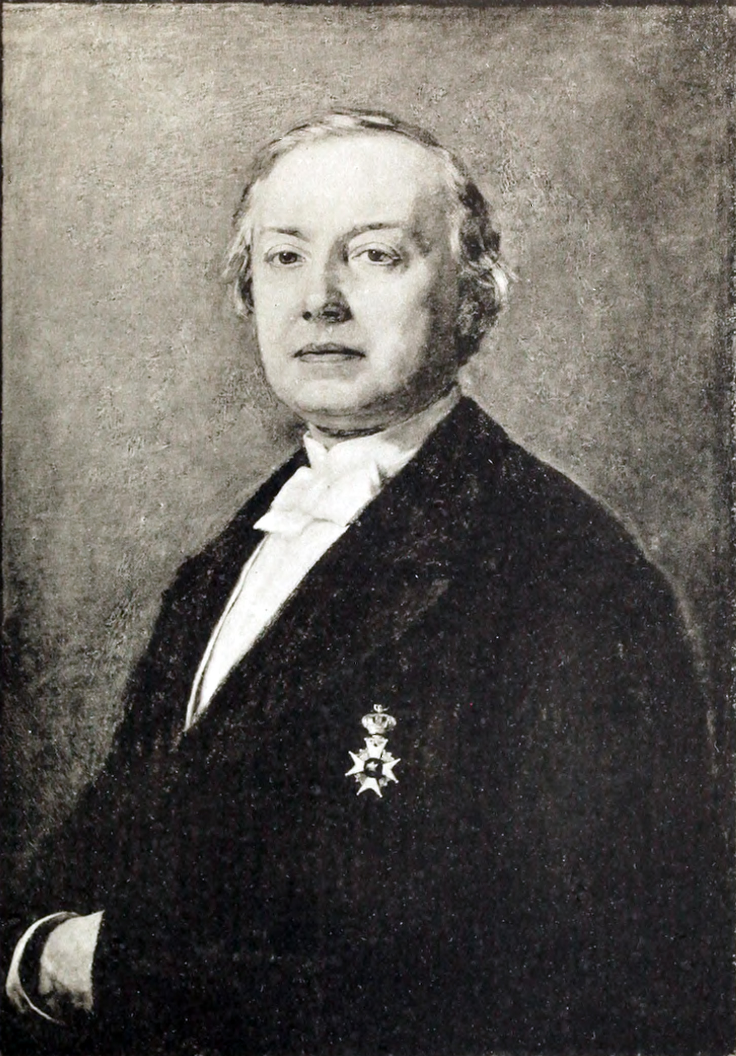 Per Hedenius (1828-1896)